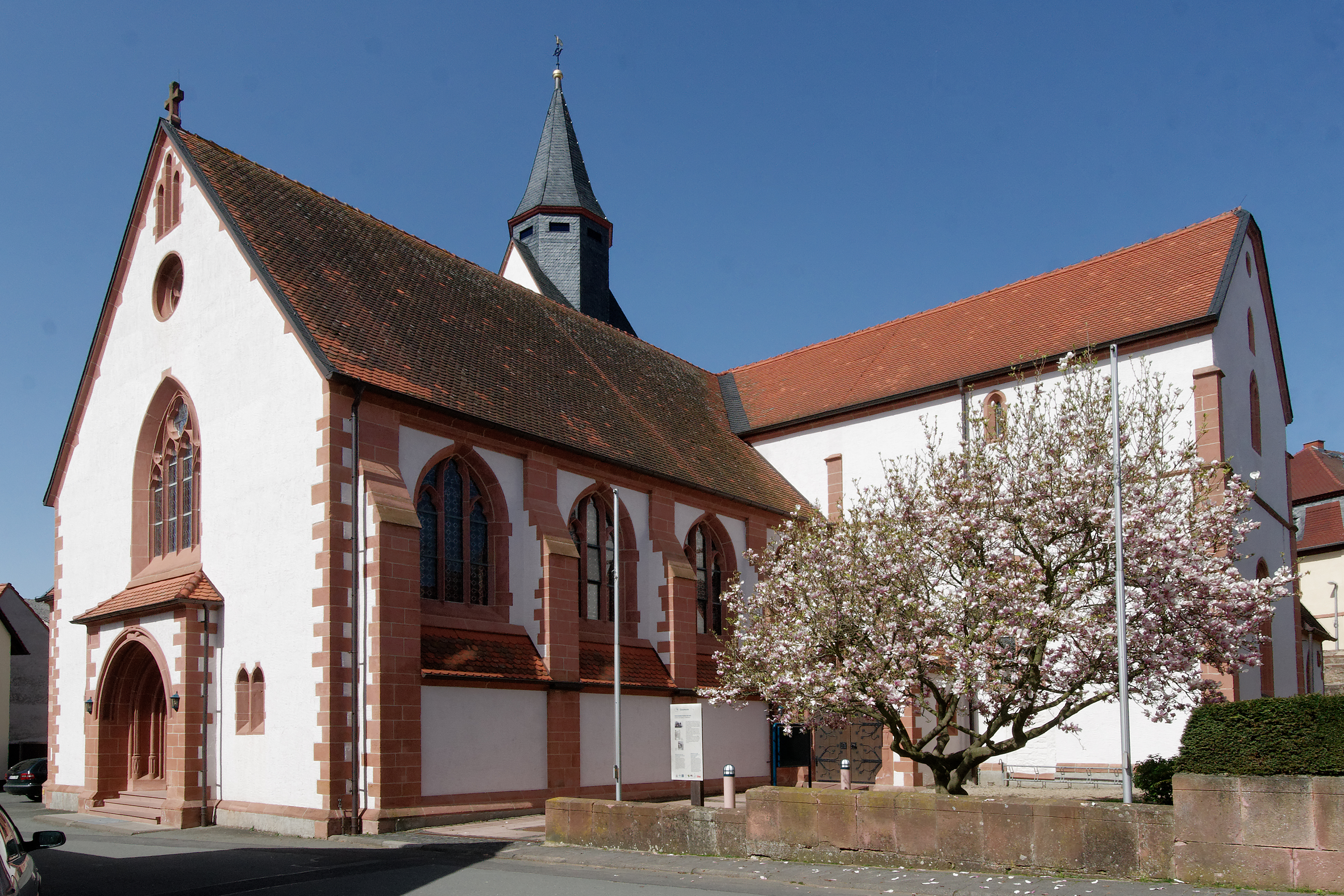 Kirche St. Johannes Baptist (Johanniterkirche) in Mosbach, einem Ortsteil der Gemeinde Schaafheim (Hessen). Die ursprüngliche Kirche wurde um 1250 von den Johannitern erbaut; das Seitenschiff rechts stammt noch aus dieser Zeit. Das Langhaus wurde 1906 erbaut.